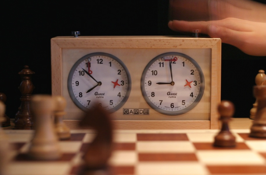 Schachuhr mechanisch